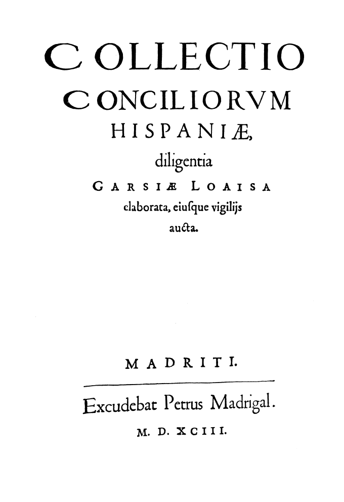 Portada del libro Collectio Conciliorum Hispaniae de García Loaysa y Girón, publicado en Madrid en 1593. Obra de temática histórico eclesiástica, mediante la recopilación de todos los concilios celebrados en España hasta el siglo XVI.